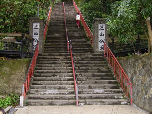 中文（台灣）: 臺北市芝山公園百二十崁。